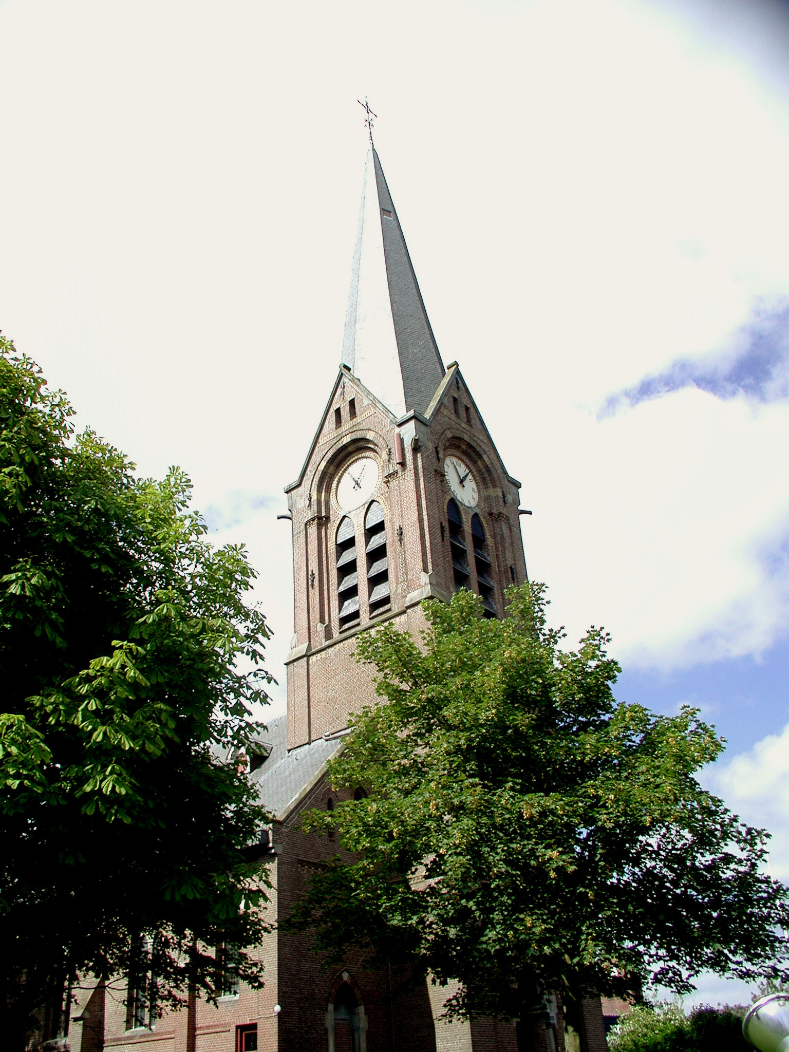 kerk van Kloosterburen